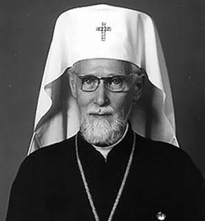 Павел (Гусев-Олмари), архиепископ Карельский